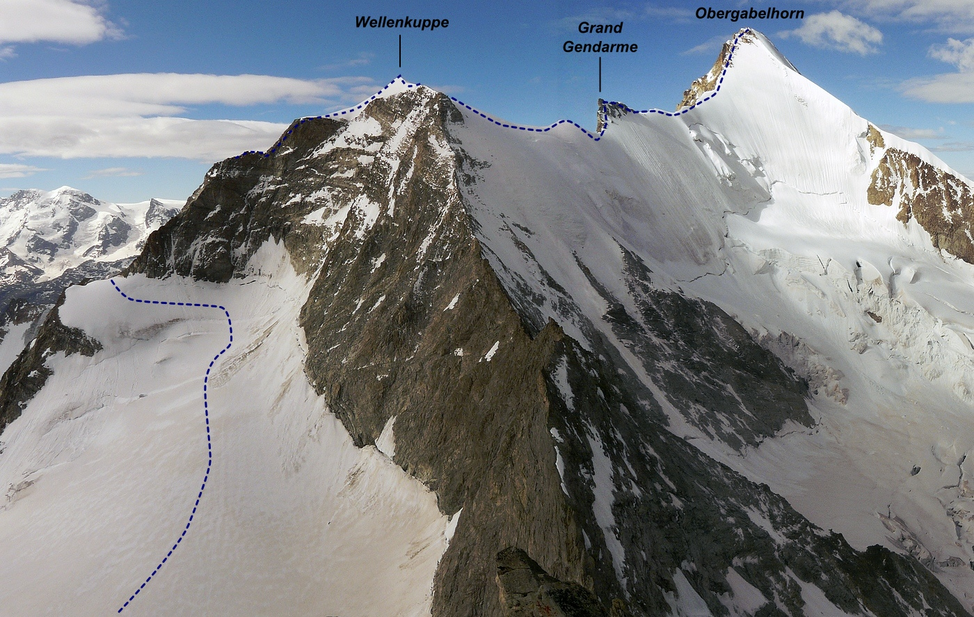 Traversata Wellenkuppe e Obergabelhorn (via normale all'Obergabelhorn) con indicazioni del percorso